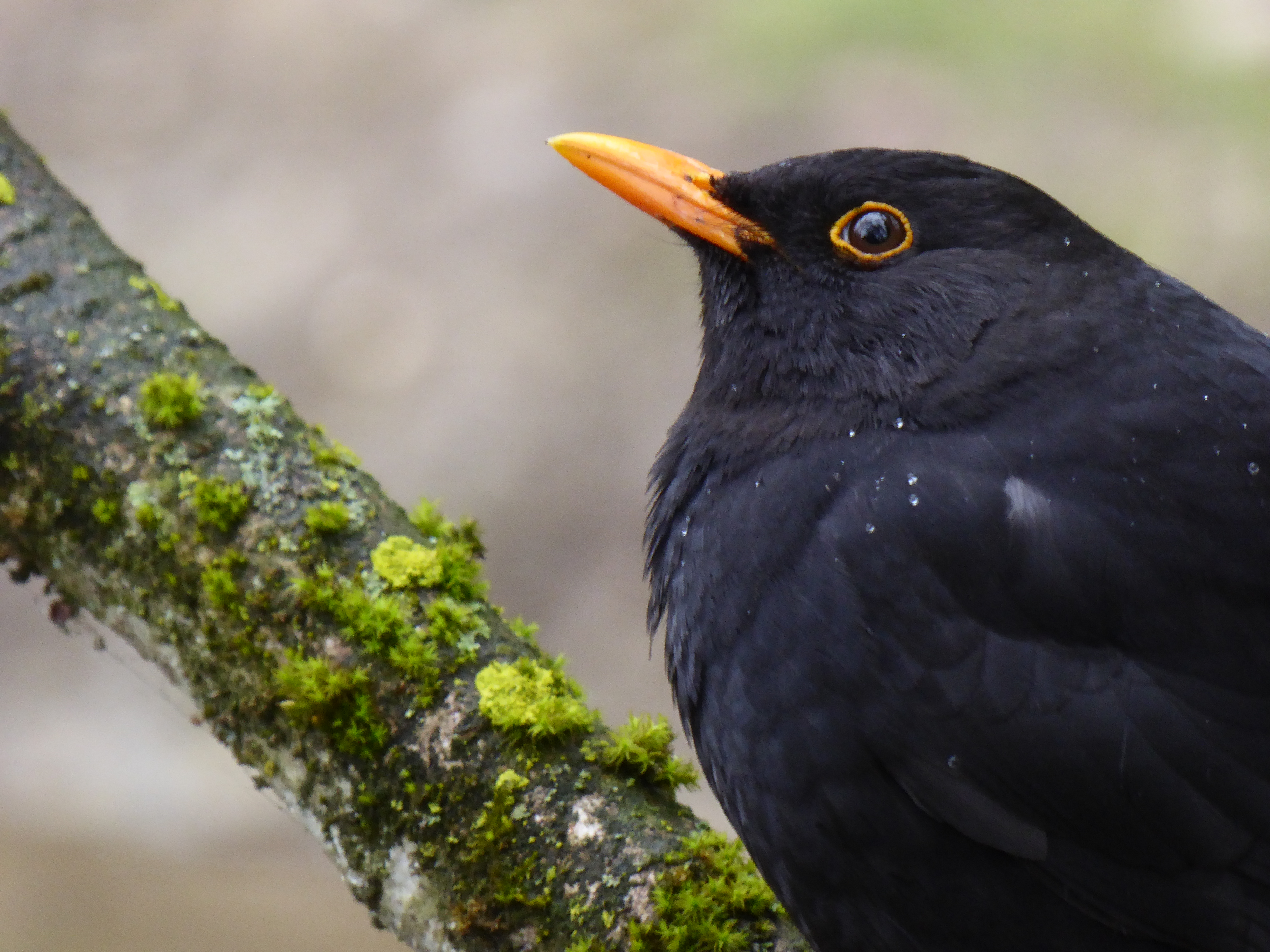 Amsel im Tierpark Hellabrunn